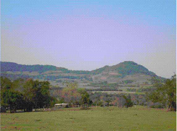 Inhacurutum Hill, near São Luiz Gonzaga, Brasil